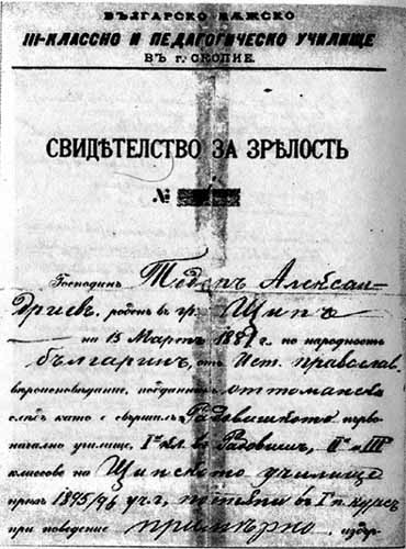 Todor_Aleksandrov_Zrelost_1898.jpg